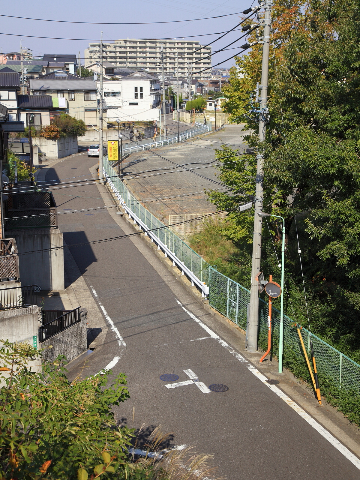 釜ケ谷付近（名古屋市緑区桶狭間北2丁目、2012年）